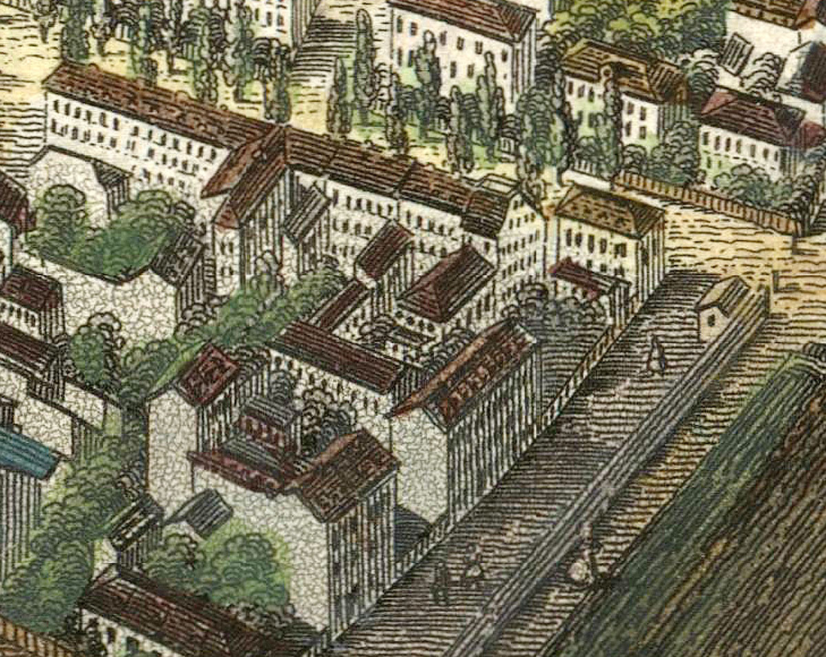 Leipzig, Saalbau des späteren Konzert- und Ballhauses Pantheon, Dresdner Straße 20, Ecke Gerichtsweg